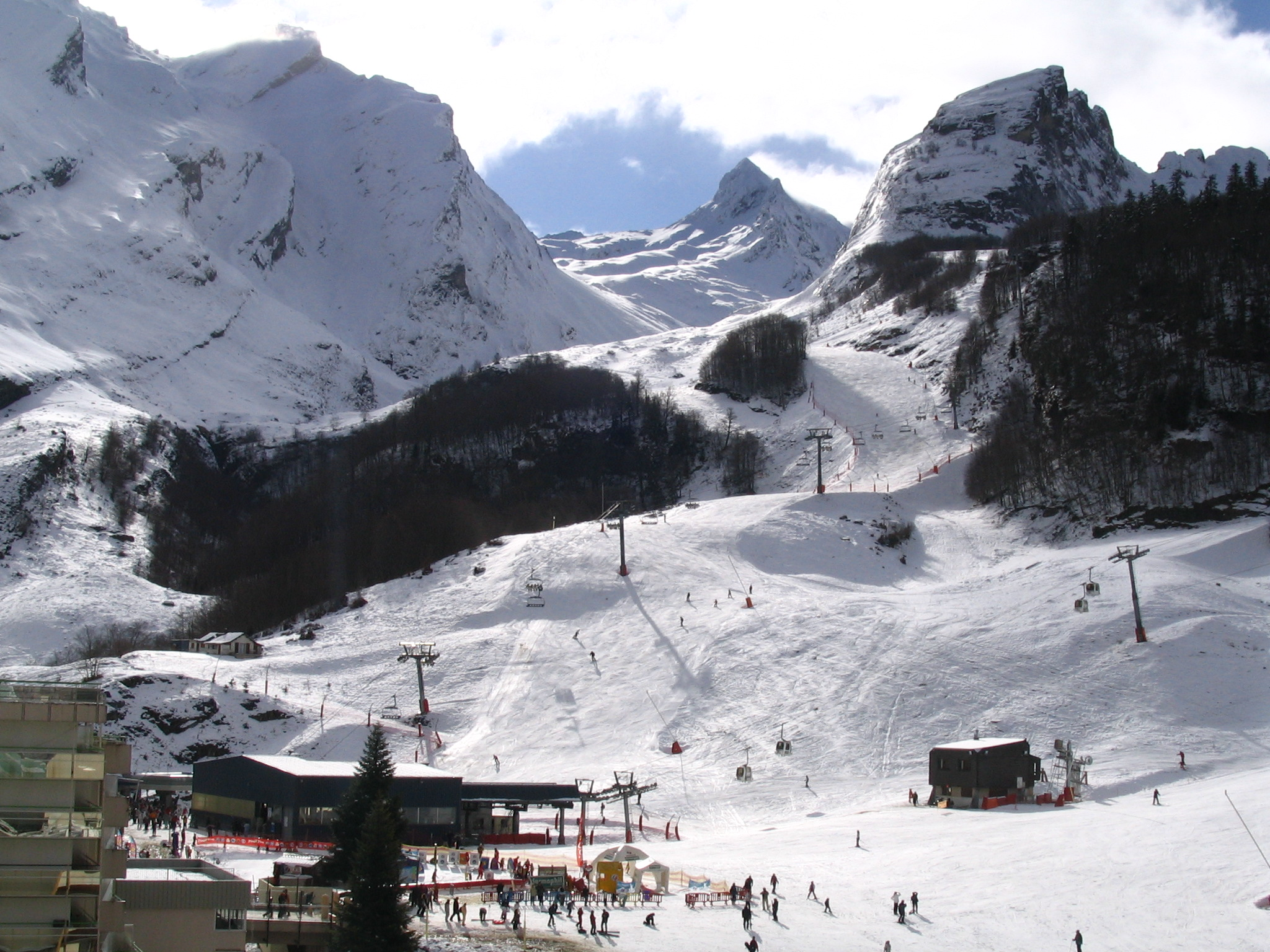 Cirque de Gourette, Pyrénées Atlantiques France Author:P.Charpiat 2007